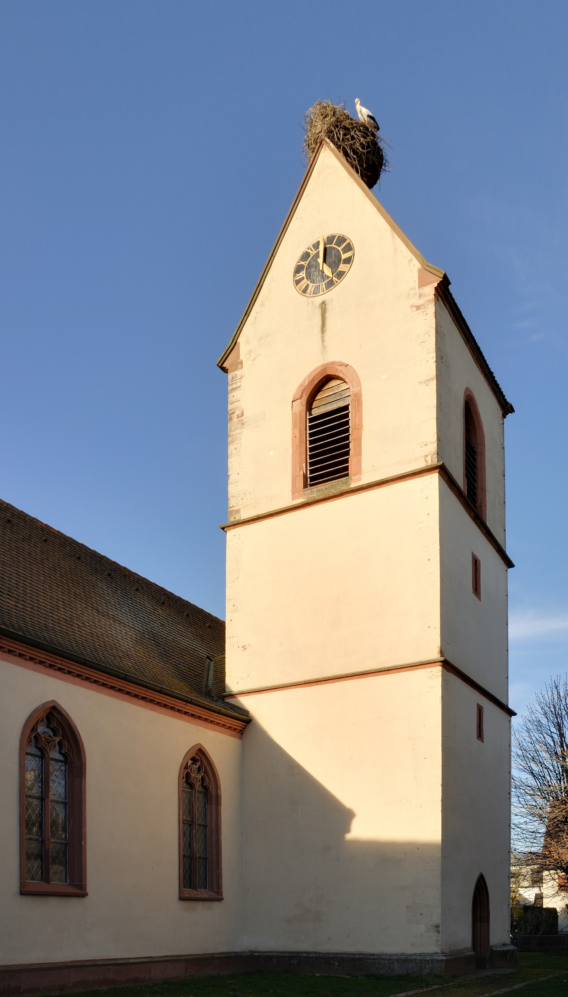 Eimeldingen: Evangelische Kirche, Glockenturm